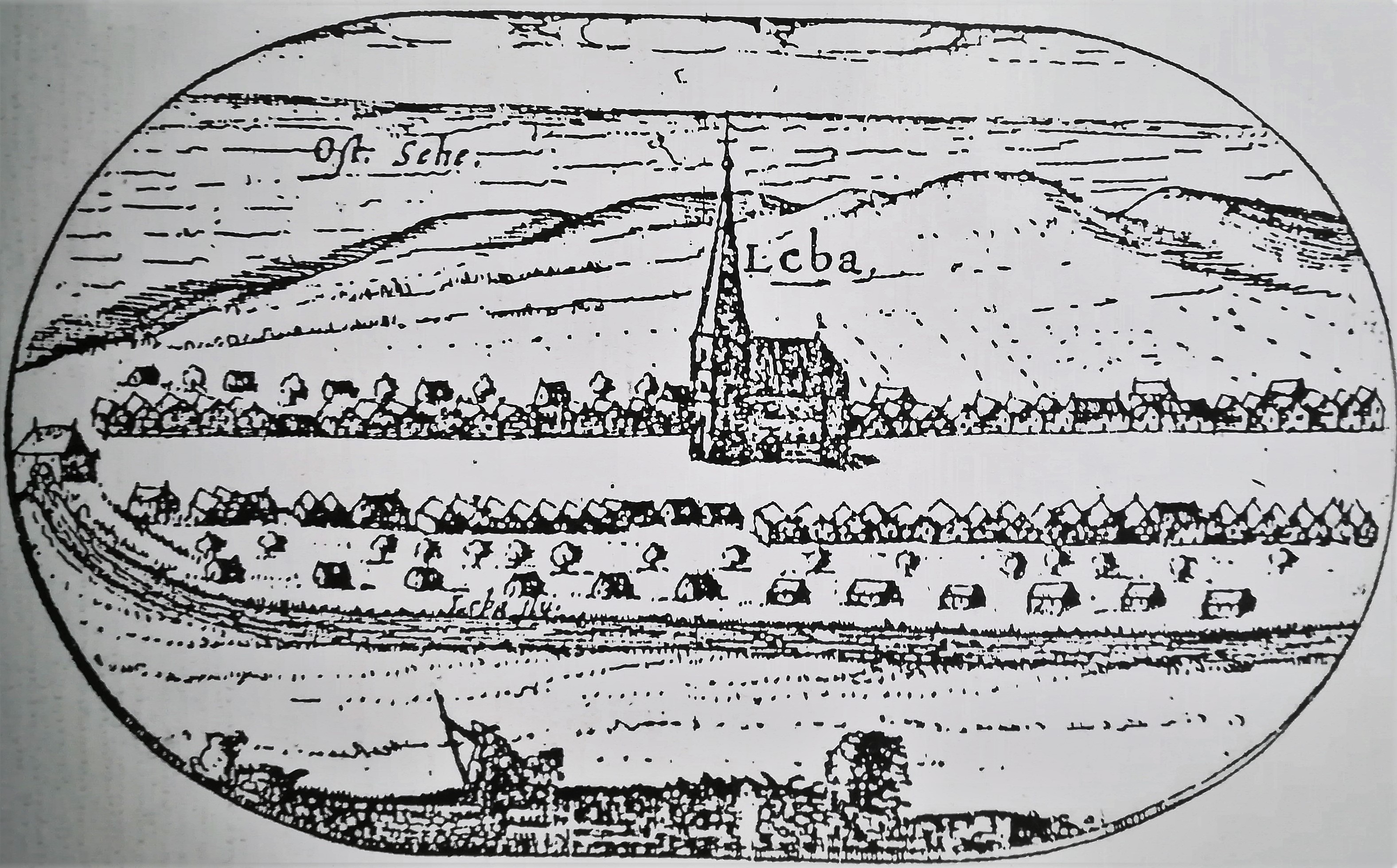 Plan Łeby Lubinusa z pocz. XVII w.